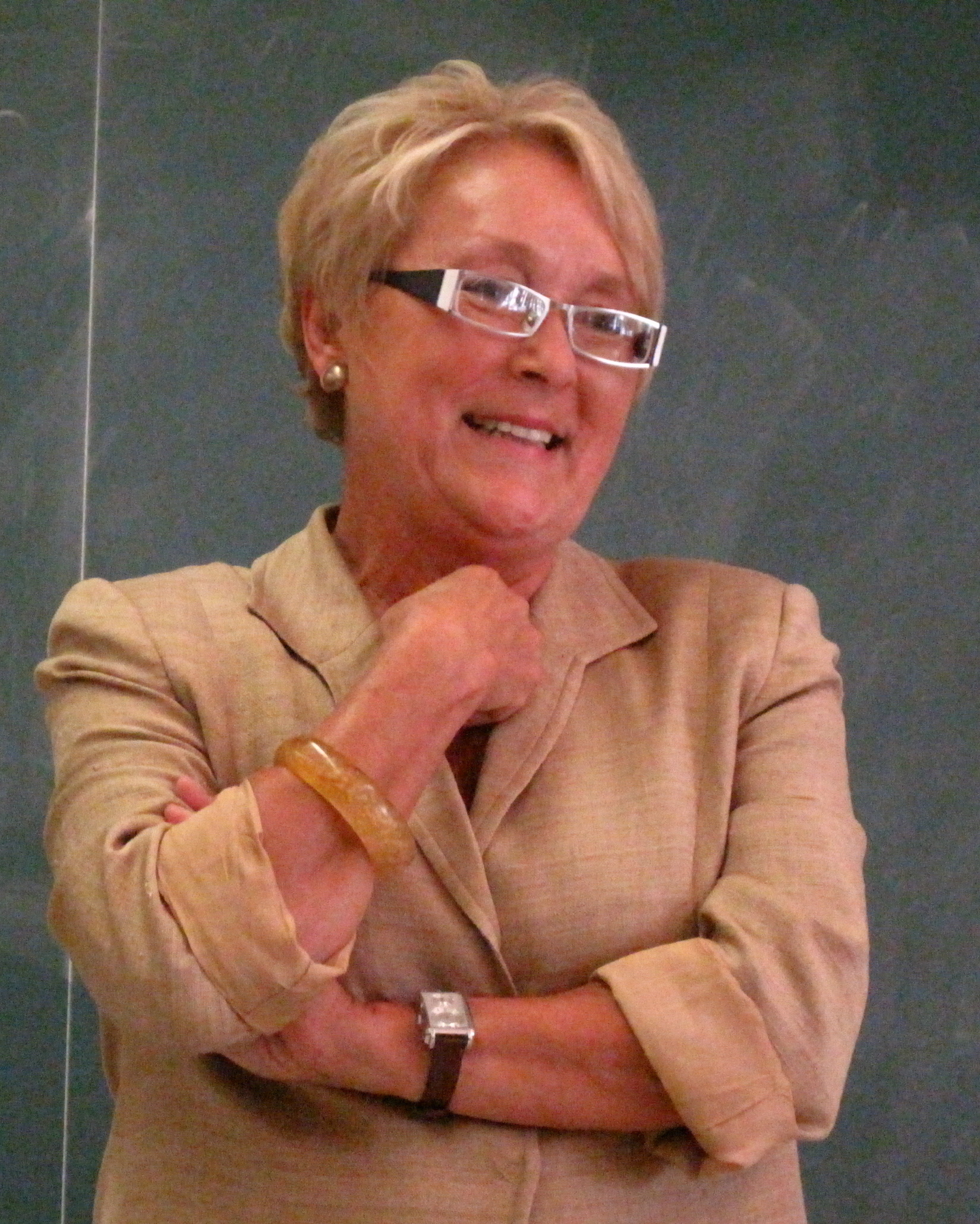 Pauline Marois au Cégep de Chicoutimi